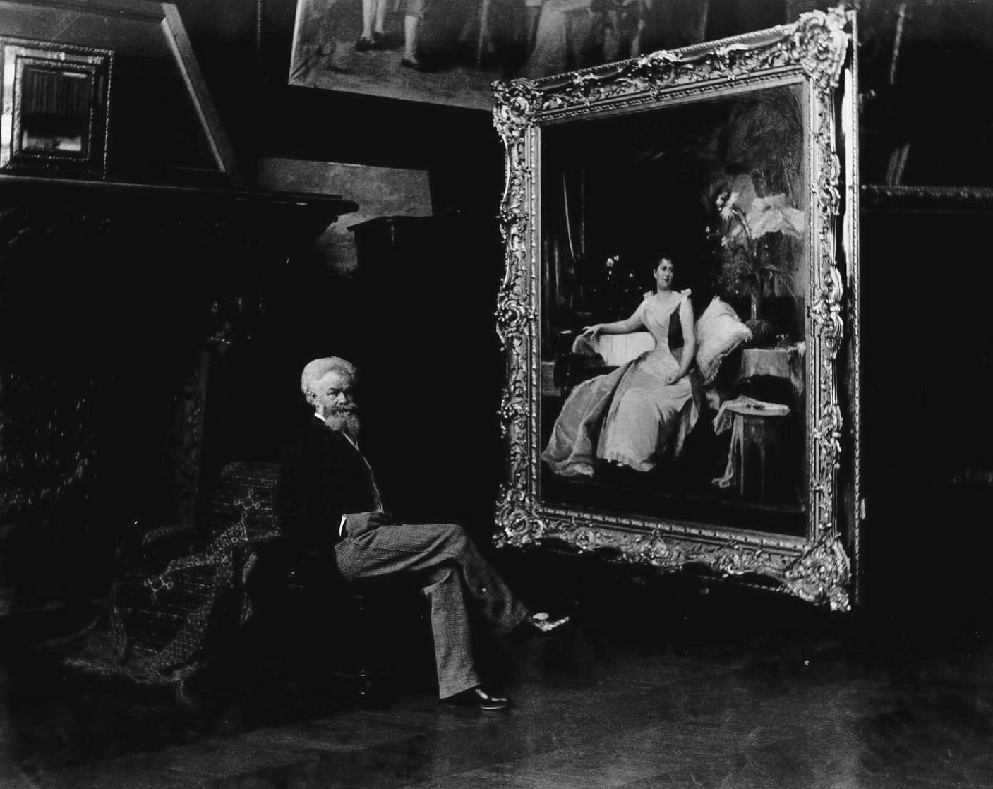 Artistes (peintres et sculpteurs) posant (seuls, en famille ou en groupe) dans leurs ateliers Note de contenuÉpreuves photographiques sur papier albuminé classées de 49 à 72 ; Clichés de provenances diverses sans doute regroupés entre la fin du XIXe siècle et le début du XXe siècle en fonction de leur sujet